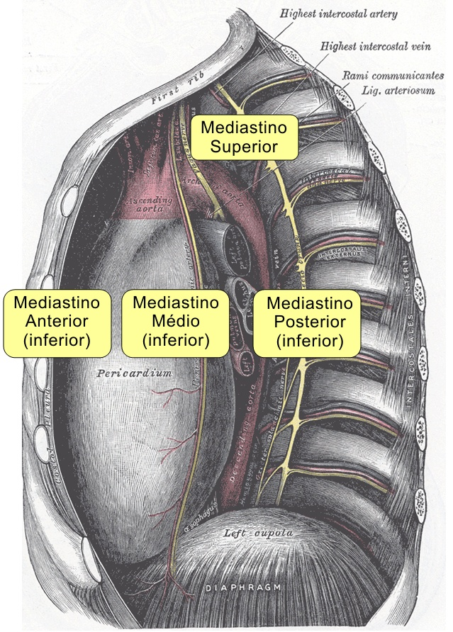 Porções do Mediastino